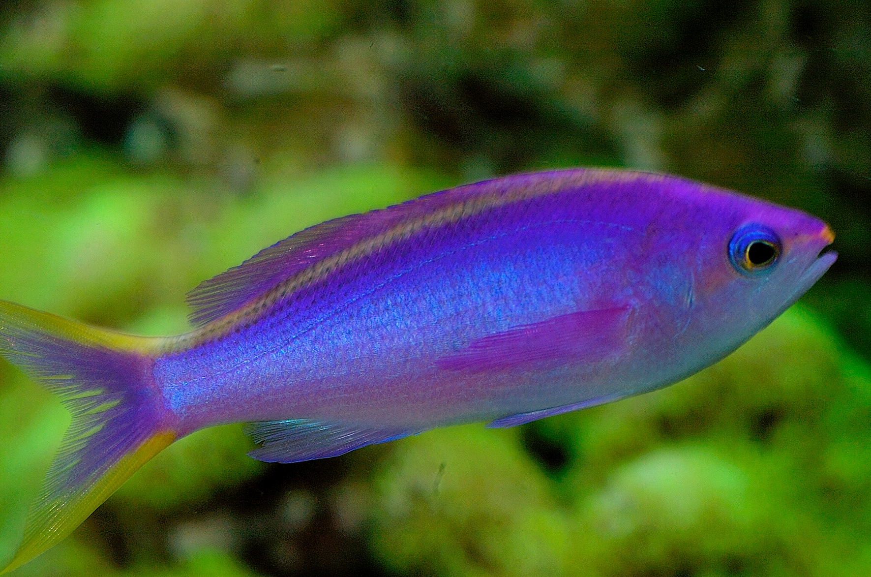 Pseudanthias tuka (female) in an aquarium